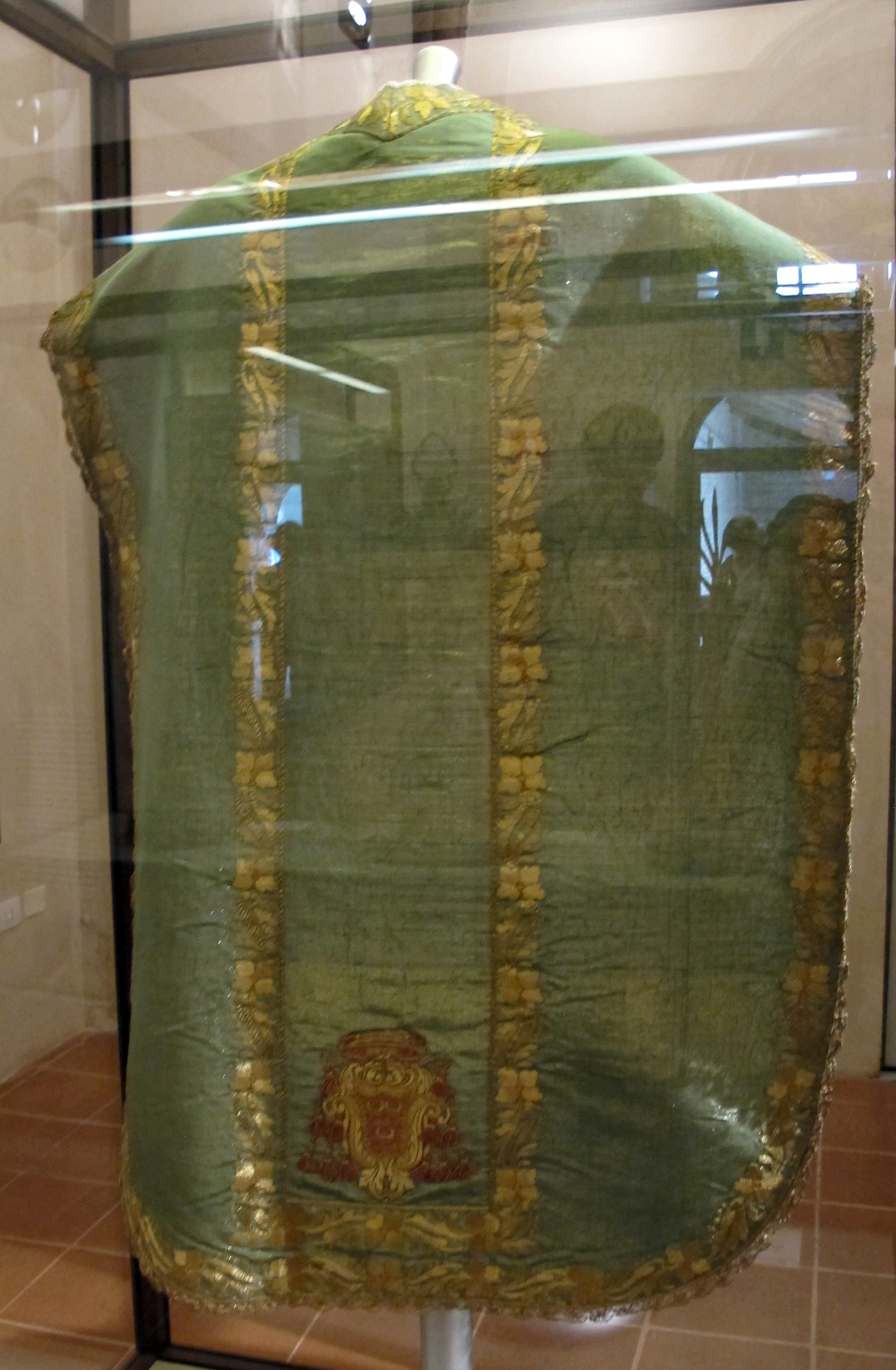 Ferrara - Museo della Cattedrale This is a photo of a monument which is part of cultural heritage of Italy.